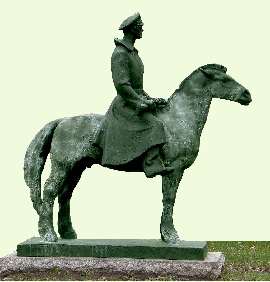 Bronzová plastika kapitána Jána Nálepku /od majstra Jána Kulicha/ v Stupave. Jazdeckú sochu kpt. Nálepku odhalili na stupavskom námestí v roku 1973. Po novembri 1989 vandali pomaľovali bronzového koňa bielymi pruhmi a dielo potom stupavskí konšeli osadili na okraj lesa, kde bolo terčom útokov. Dnes je socha presunutá do areálu základnej školy.